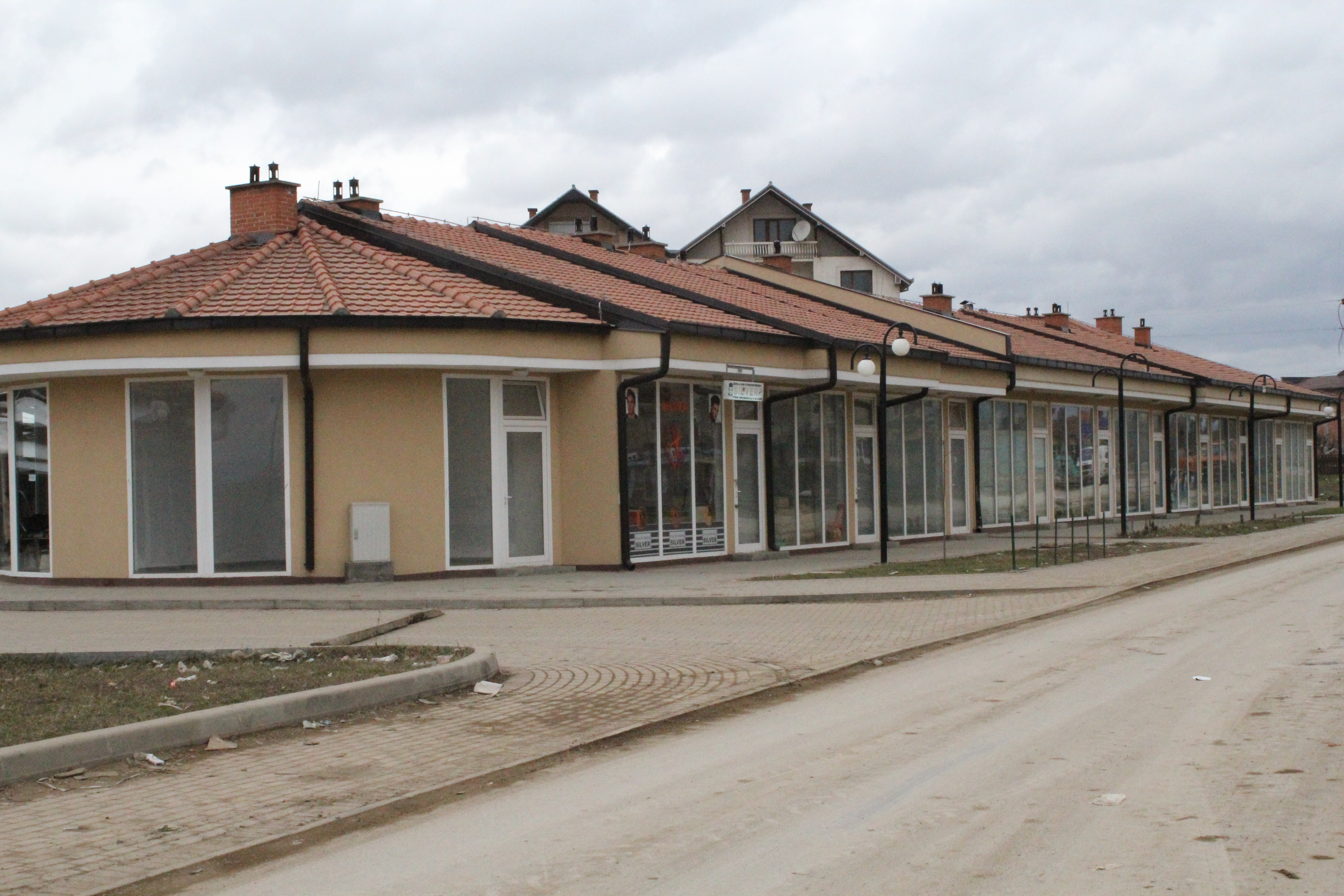 Pamje e lokaleve te tregut 2